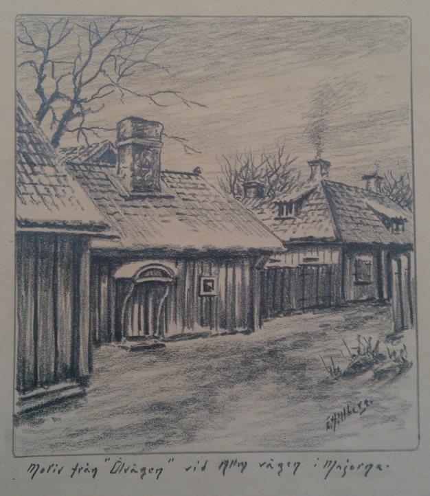 Kolteckning av Einar Hillberg föreställande Ölvägen i Majorna Göteborg